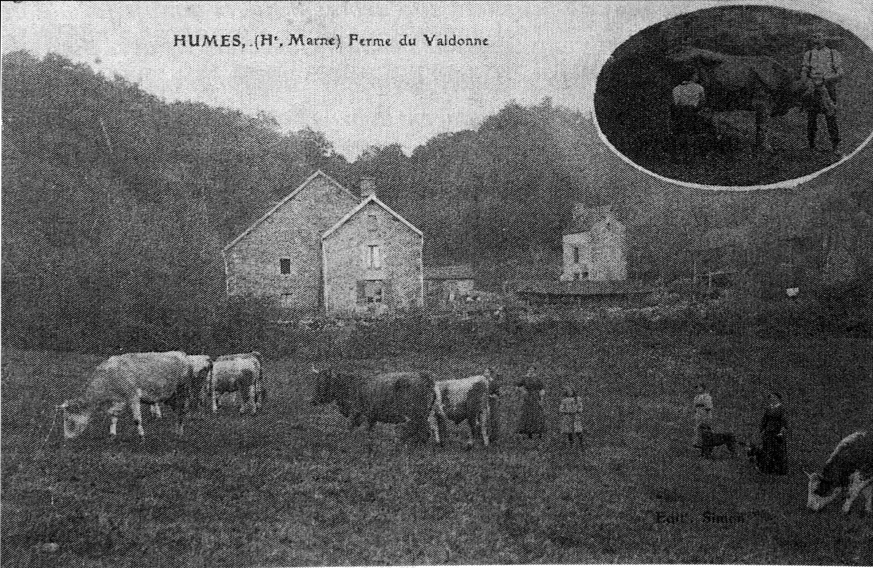 par une carte des éditions Simon.